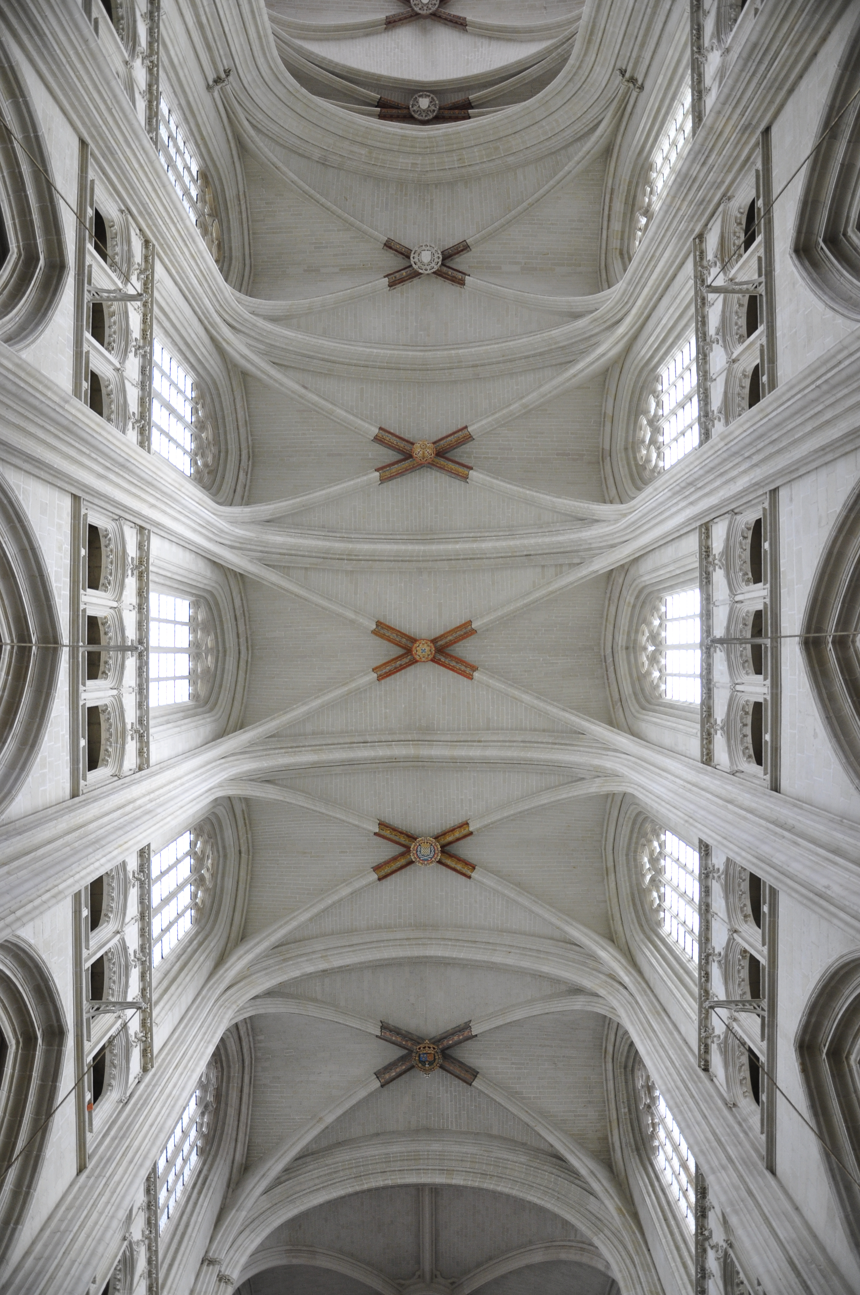 Cathédrale Saint-Pierre de Nantes (Loire-Atlantique, France) .